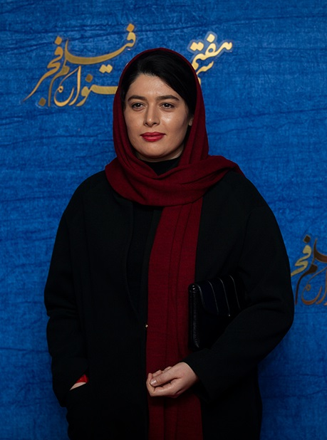 ژیلا شاهی در نشست خبری فیلم روزهای نارنجی، سی و هفتمین دوره جشنواره فیلم فجر